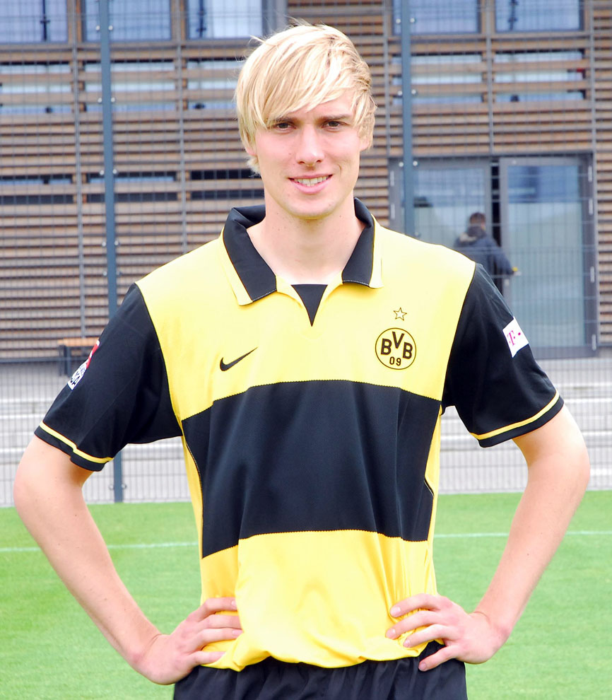 Martin Amedick bei der Mannschaftsvorstellung 2007